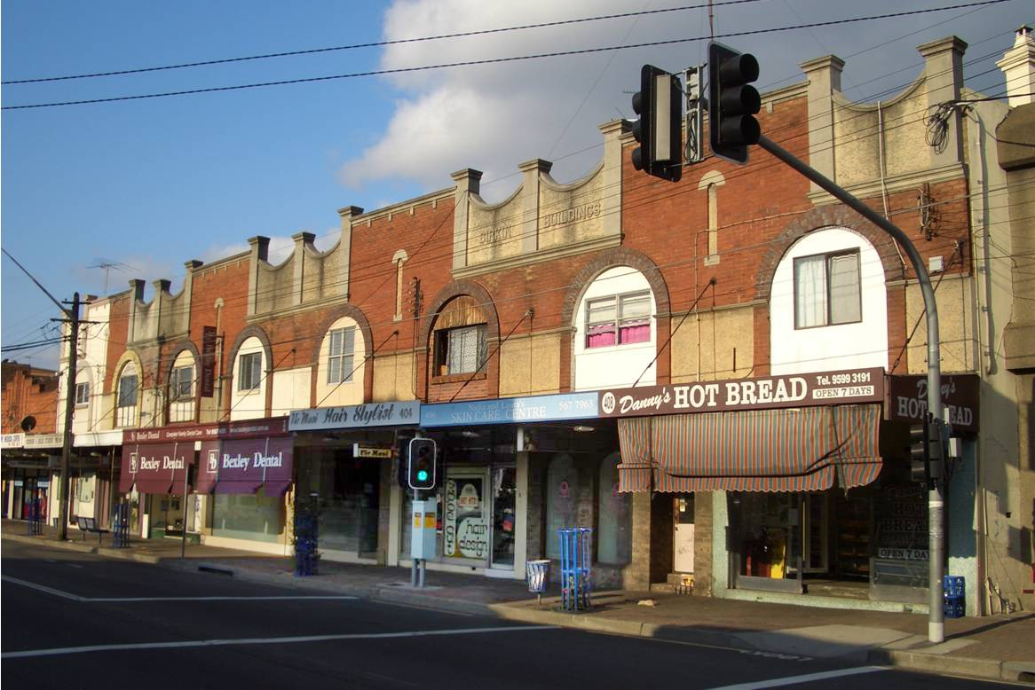 Bexley, Sydney